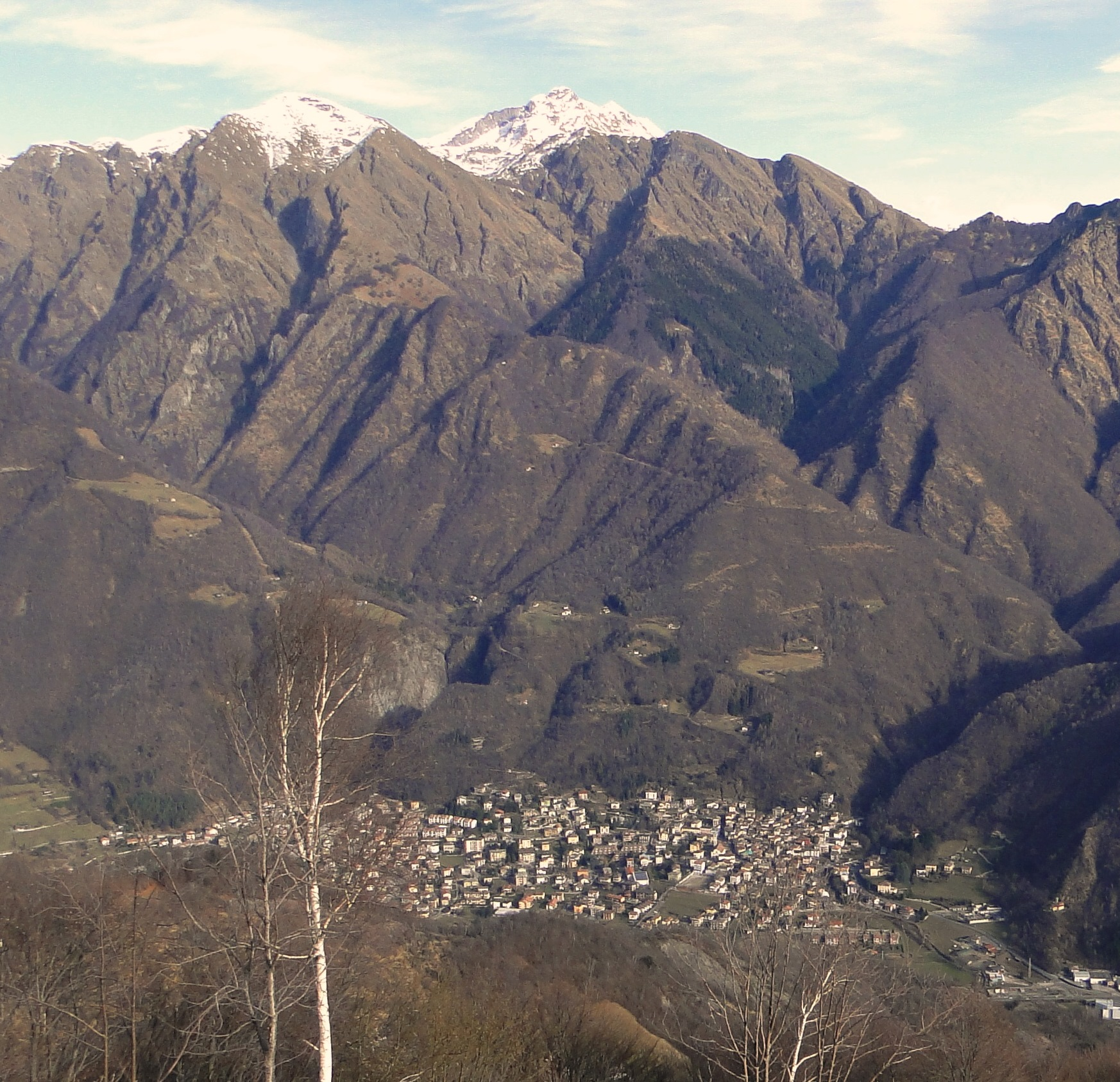 Introbio, Valsassina (LC). Italy